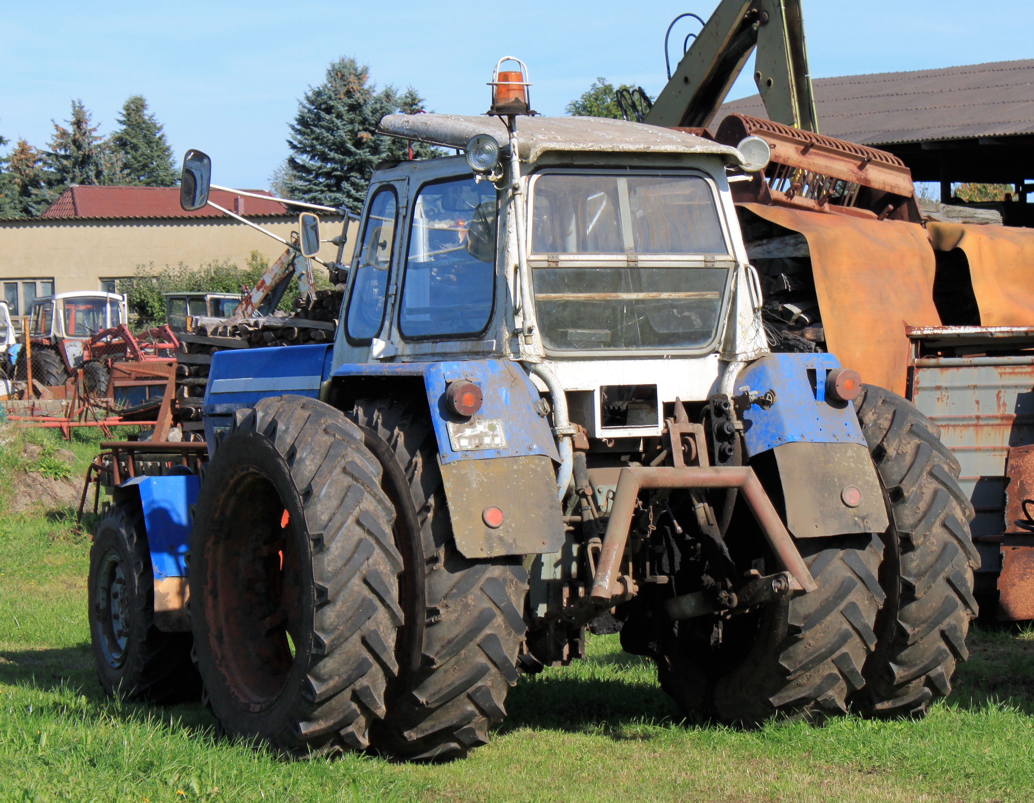 ZT 303